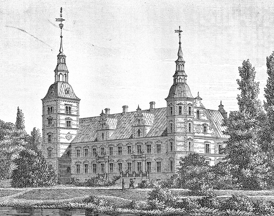 Orebygaard er en gammel hovedgård, som nævnes første gang i 1231. Gården ligger i Sakskøbing Landsogn, Musse Herred, Maribo Amt, Sakskøbing Kommune. Hovedbygningen er opført i 1578-1587.